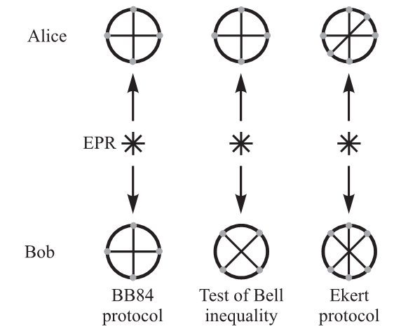 Квантовые состояния, используемые в различных протоколах